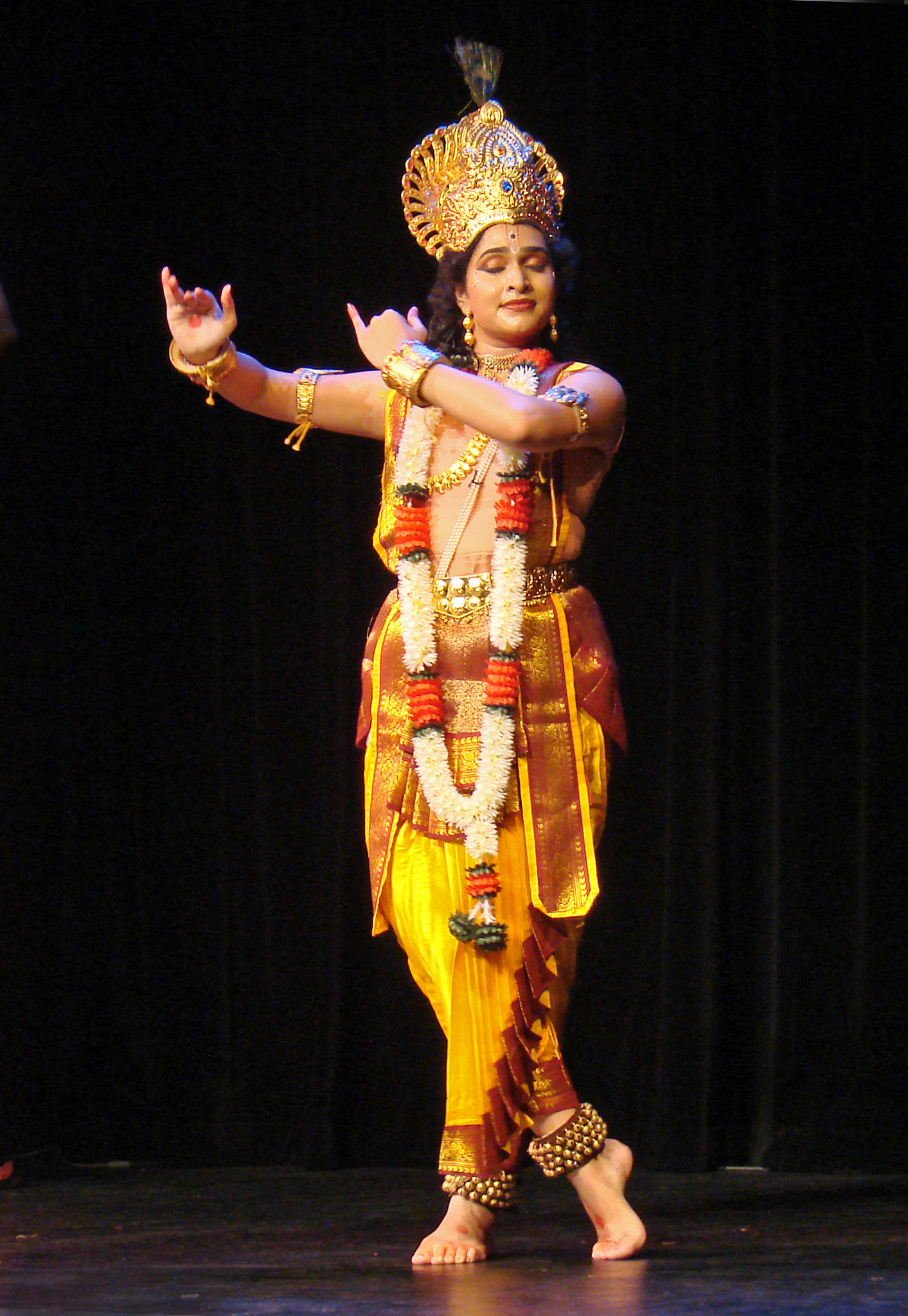 Alokaye Balakrishnam, pièce de Tarangam unique dans le répertoire du Kuchipudi (composition Raga Malika et Adi Talam; chorégraphie : Kishore Mosalikanti) Mihira Pathuri (Krishna) Spectacle de danse Kuchipudi, organisé par le service de l'auditorium du musée Guimet en coproduction avec Triveni, présenté le samedi 19 avril 2008, dans l'auditorium du musée Guimet à Paris par : "Deepika Reddy et ses musiciens" Sur la photo, une des deux danseuses de la compagnie de Deepika Reddy jouant Krishna (Krishna - Kṛṣṇa, कृष्ण, aussi appelé Yadav, est une divinité importante de l'hindouisme) Cette jeune artiste appartient à Deepanjali, l'institution fondée en Inde par Deepika Reddy et qui est dédiée à l’excellence de la pratique du Kuchipudi.